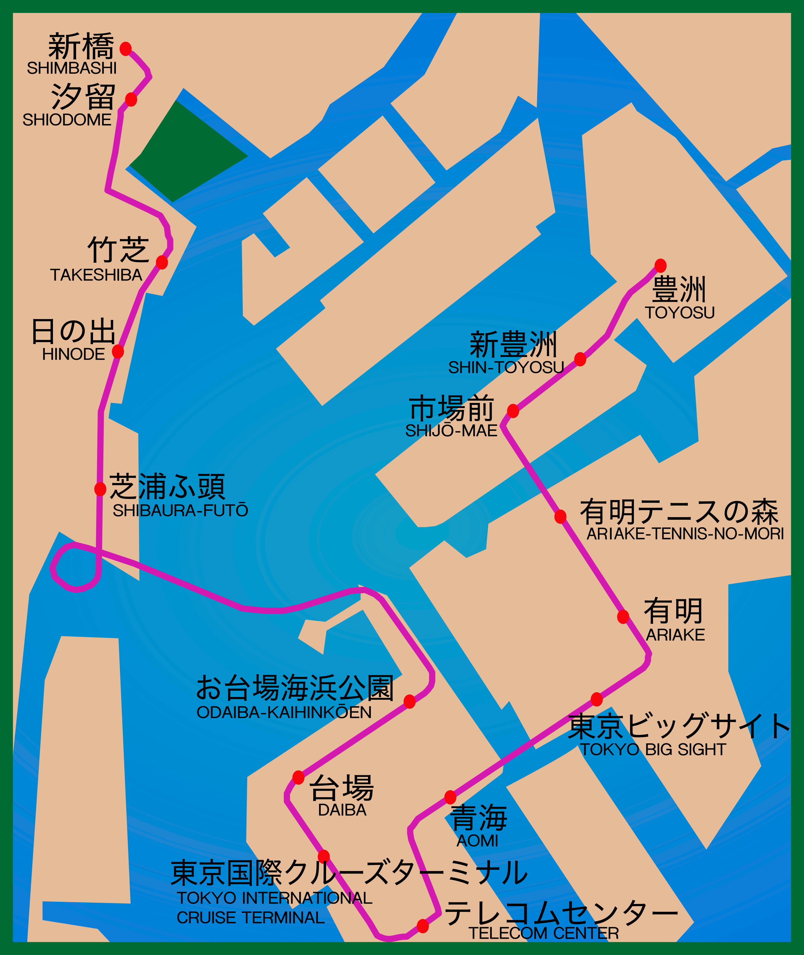 ゆりかもめ路線図